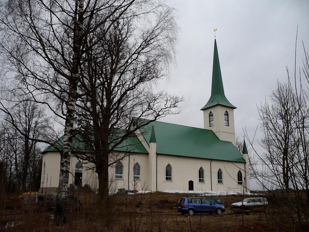 Bērzaunes luterāņu baznīca 2009-04-10